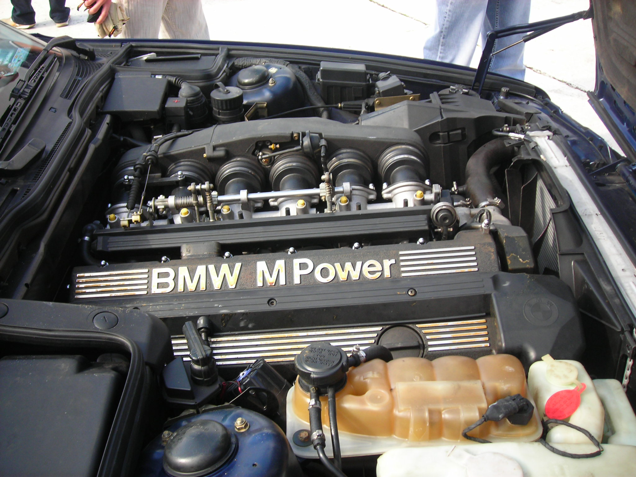 BMW M5 e34, silnik S38B36, poj.3535cm3, sterowanie Bosch Motronic 1.2,moc max.315HP/6900obr/min, max.moment obrotowy 360Nm/4750 obr/min, śr. cylindra 93,5mm, skok tłoka 86mm, stopień sprężania 10,0:1. Zlot BMW M Power Club w Toruniu.